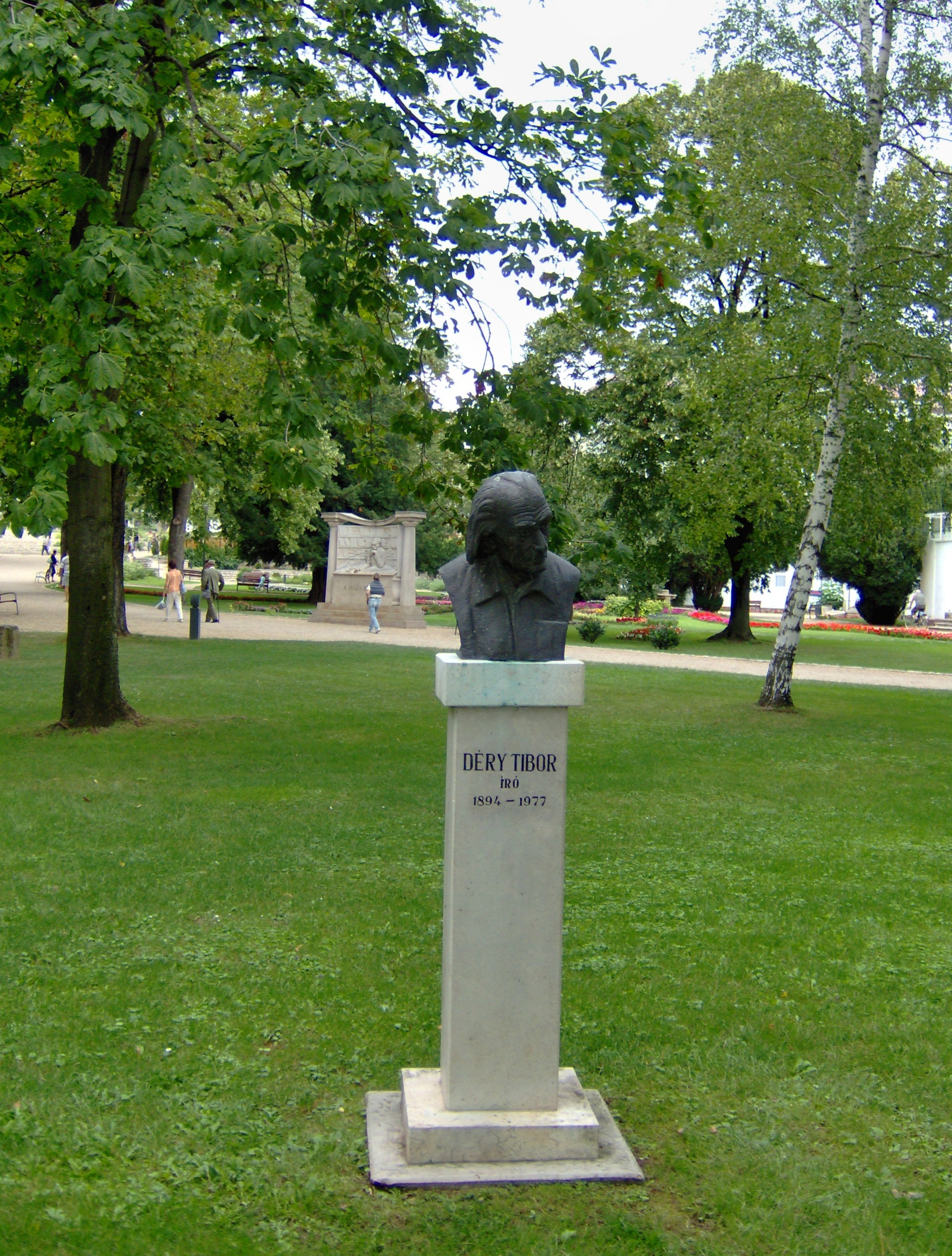 Balatonfüred